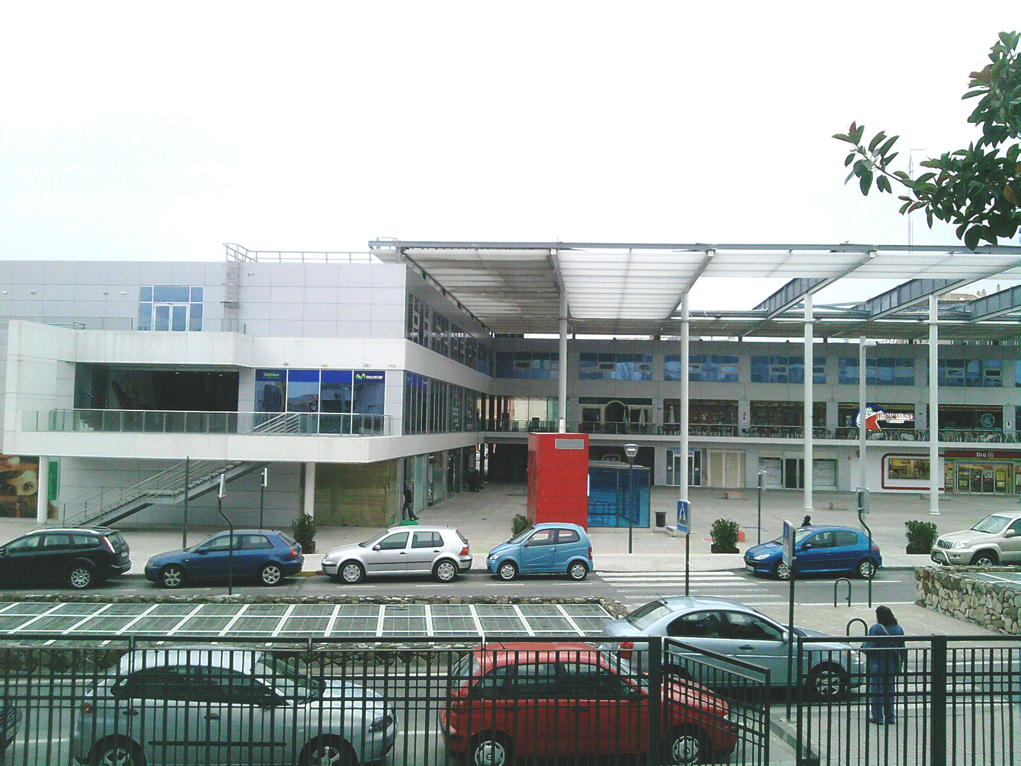 Plaza de Andalucía vista desde la Avenida de Blas Infante, Algeciras.